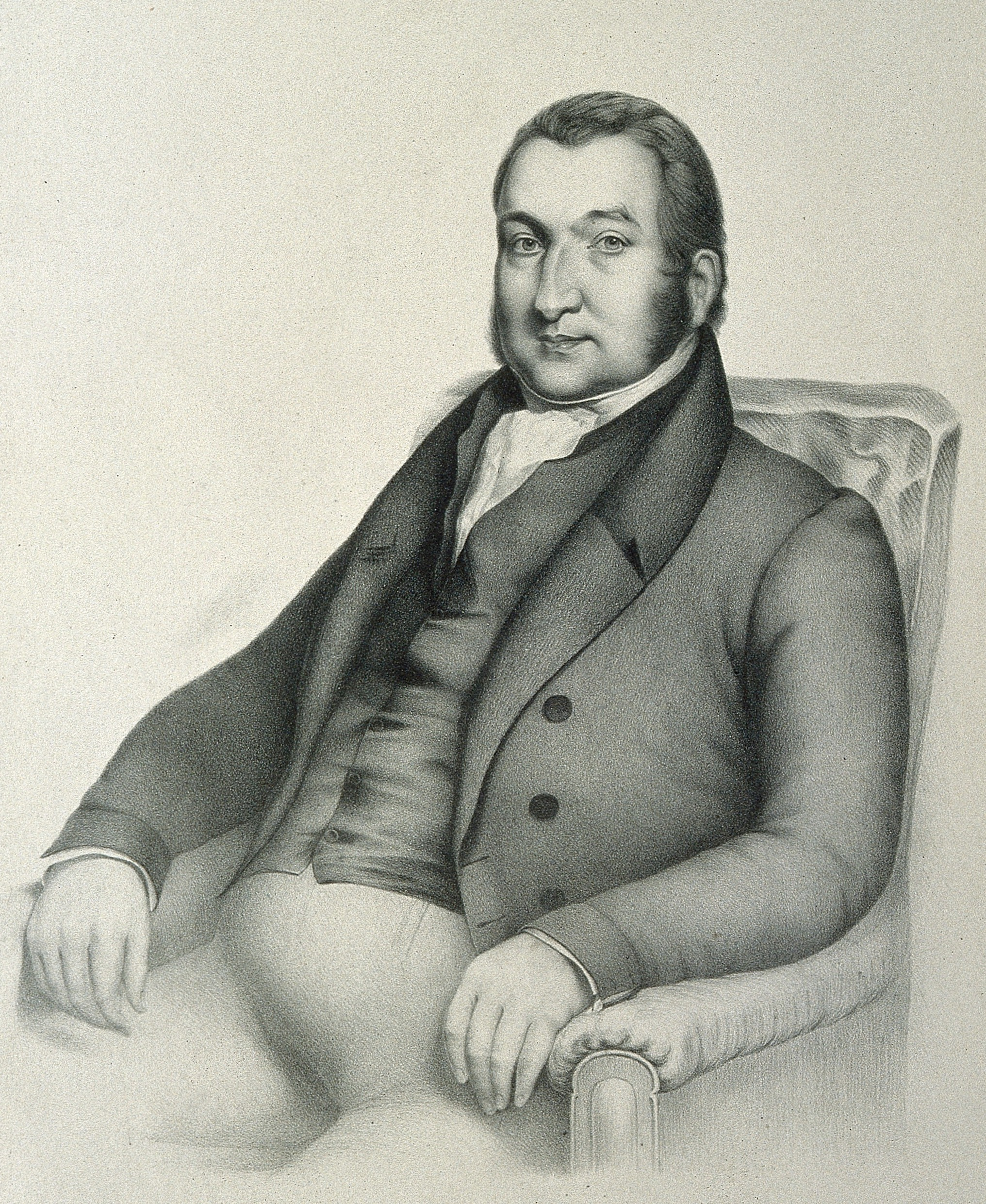 Genre/Technique: Portrait prints. Lithographs. Subject name: Ellis, William Charles, Sir, 1780-1839.